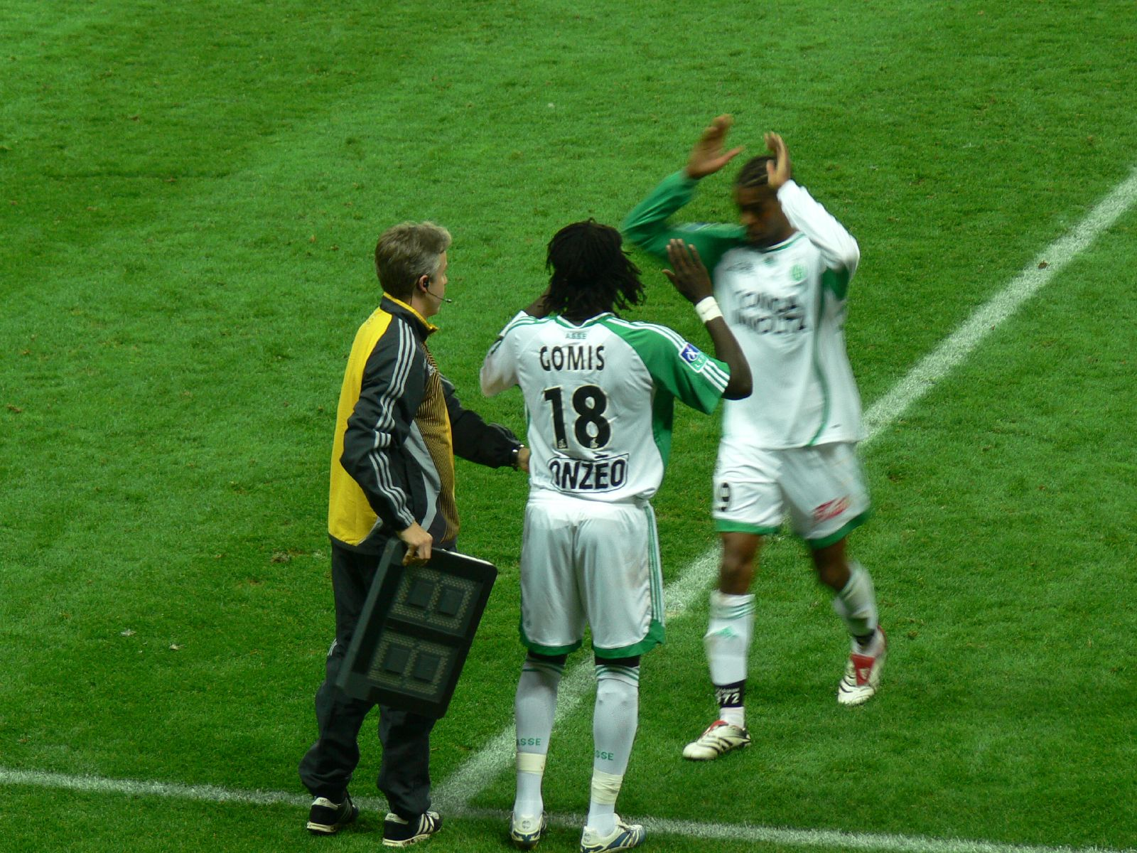 Bafetimbi Gomis s'apprête à entrer sur le terrain.